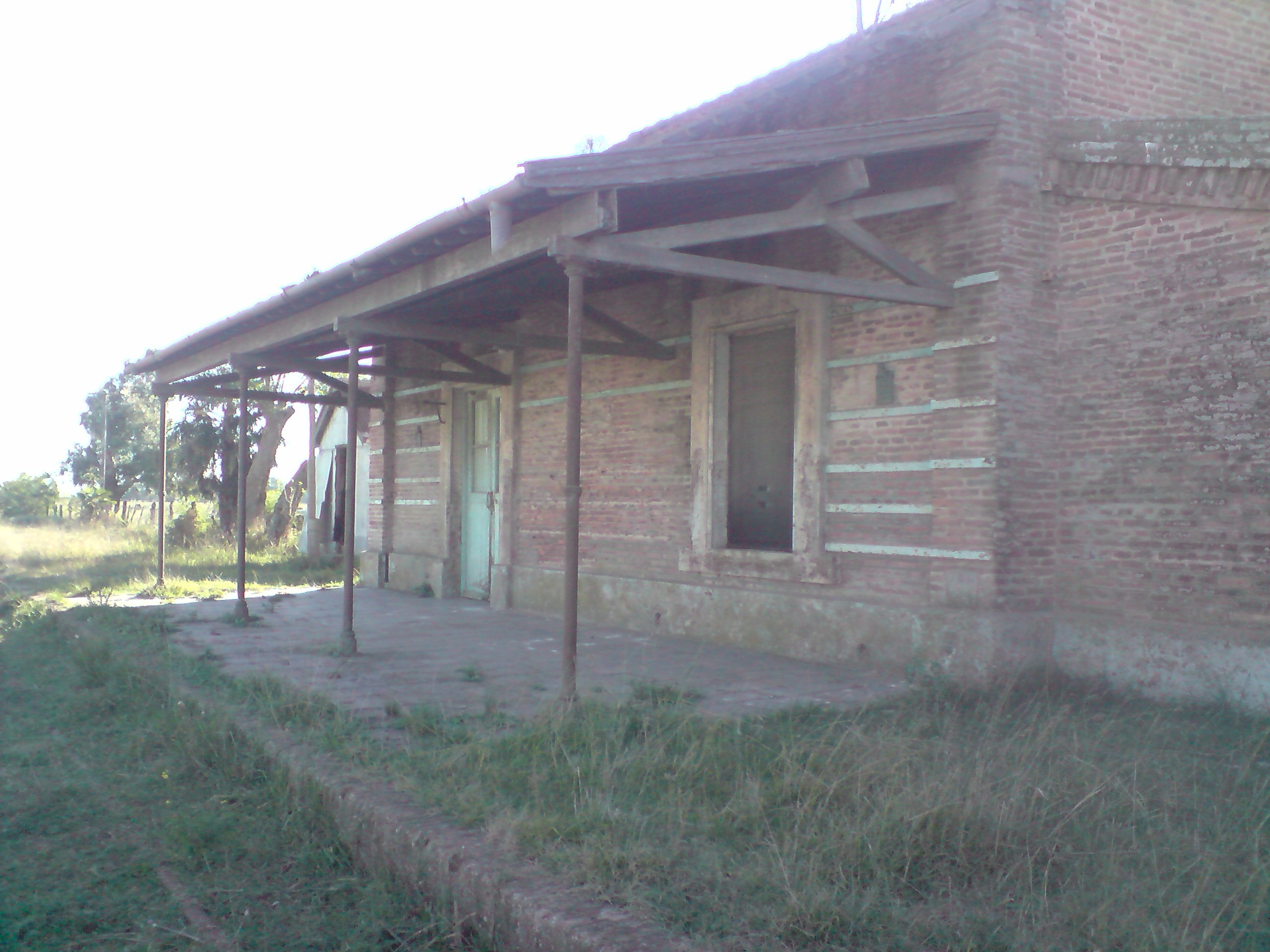 Estacion Labarden